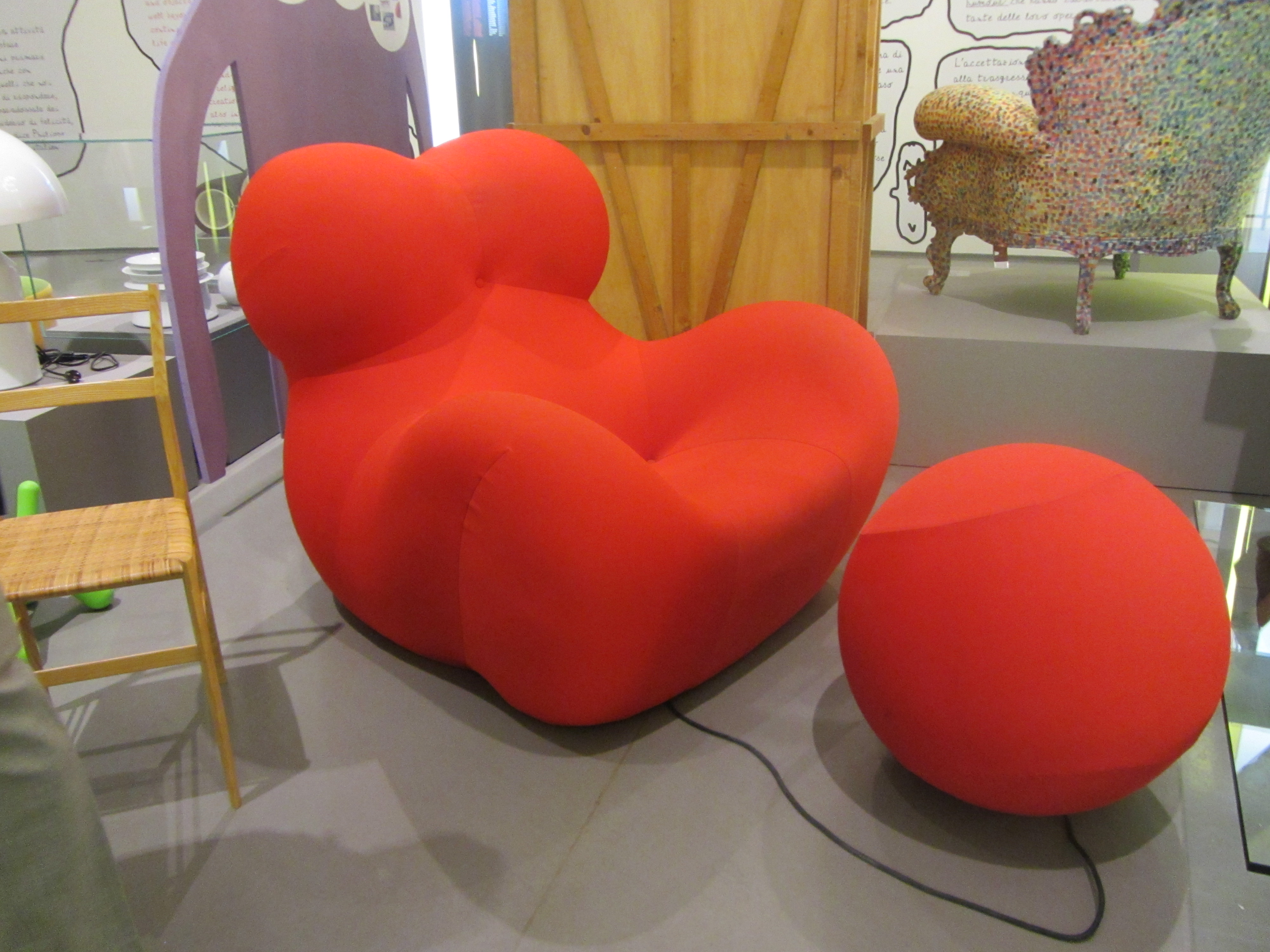 Le poltrone UP5 e UP6 al Triennale Design Museum di Milano durante la mostra "le fabbriche dei sogni" Serie UP di Gaetano Pesce B&B ITALIA 1969 + riedizione 2000